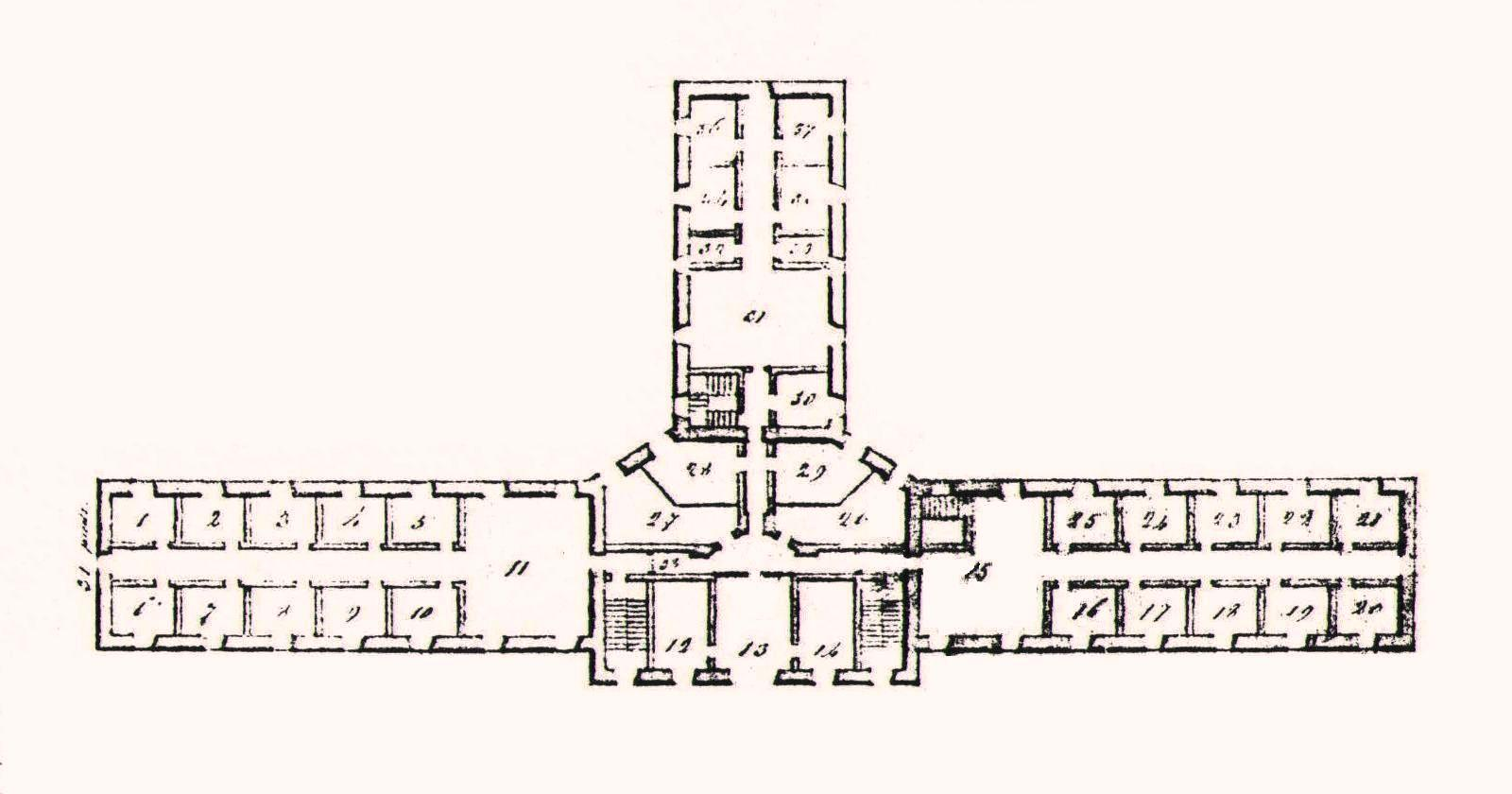 Plan du 3e étage de la Prison neuve de Montréal